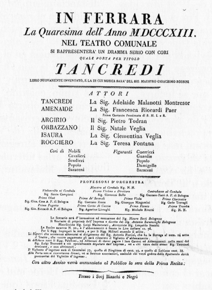 Cartel del estreno de Tancredi (Rossini) en el Teatro Comunale de Ferrara en 1813.